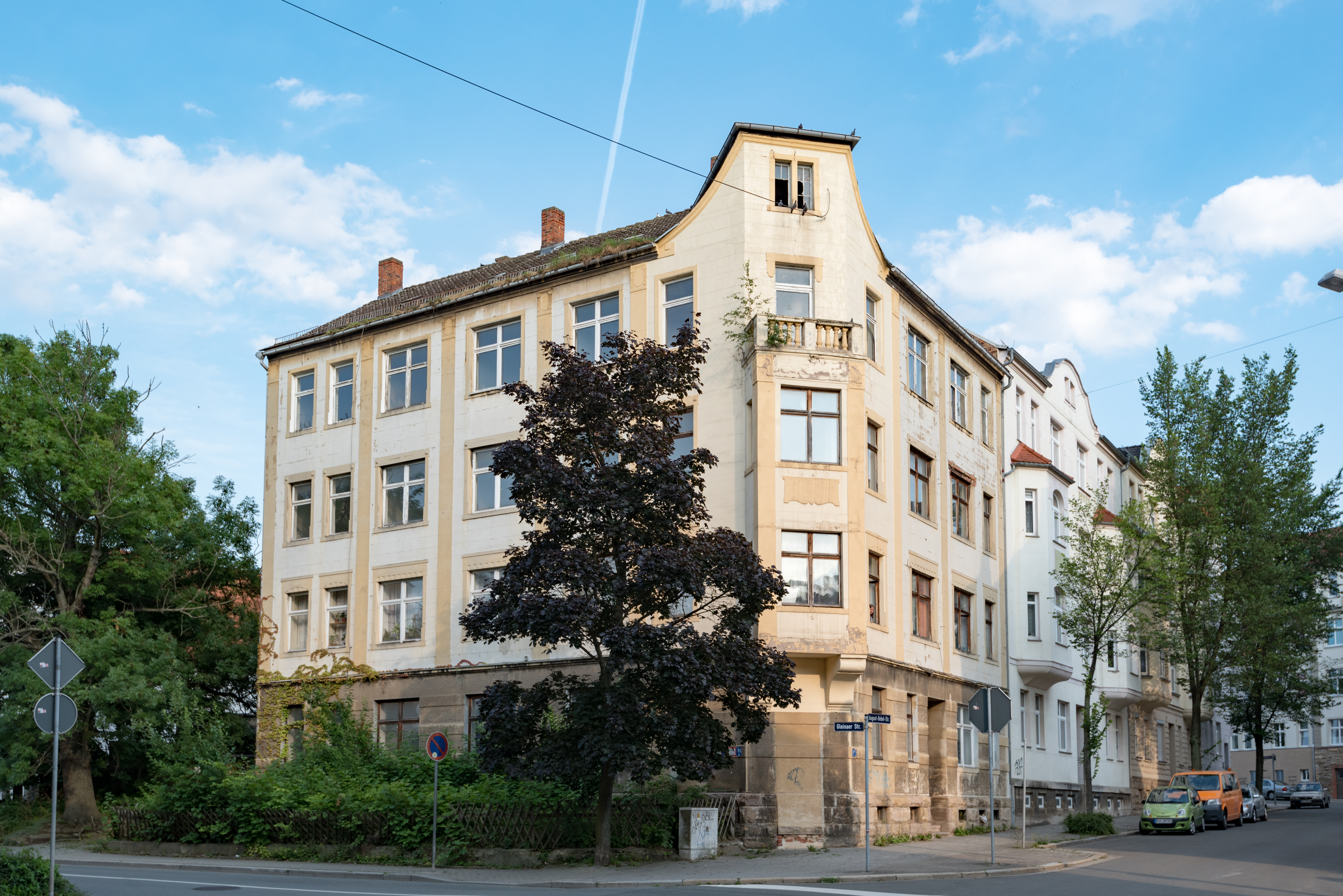 Zeitz, August-Bebel-Straße 67